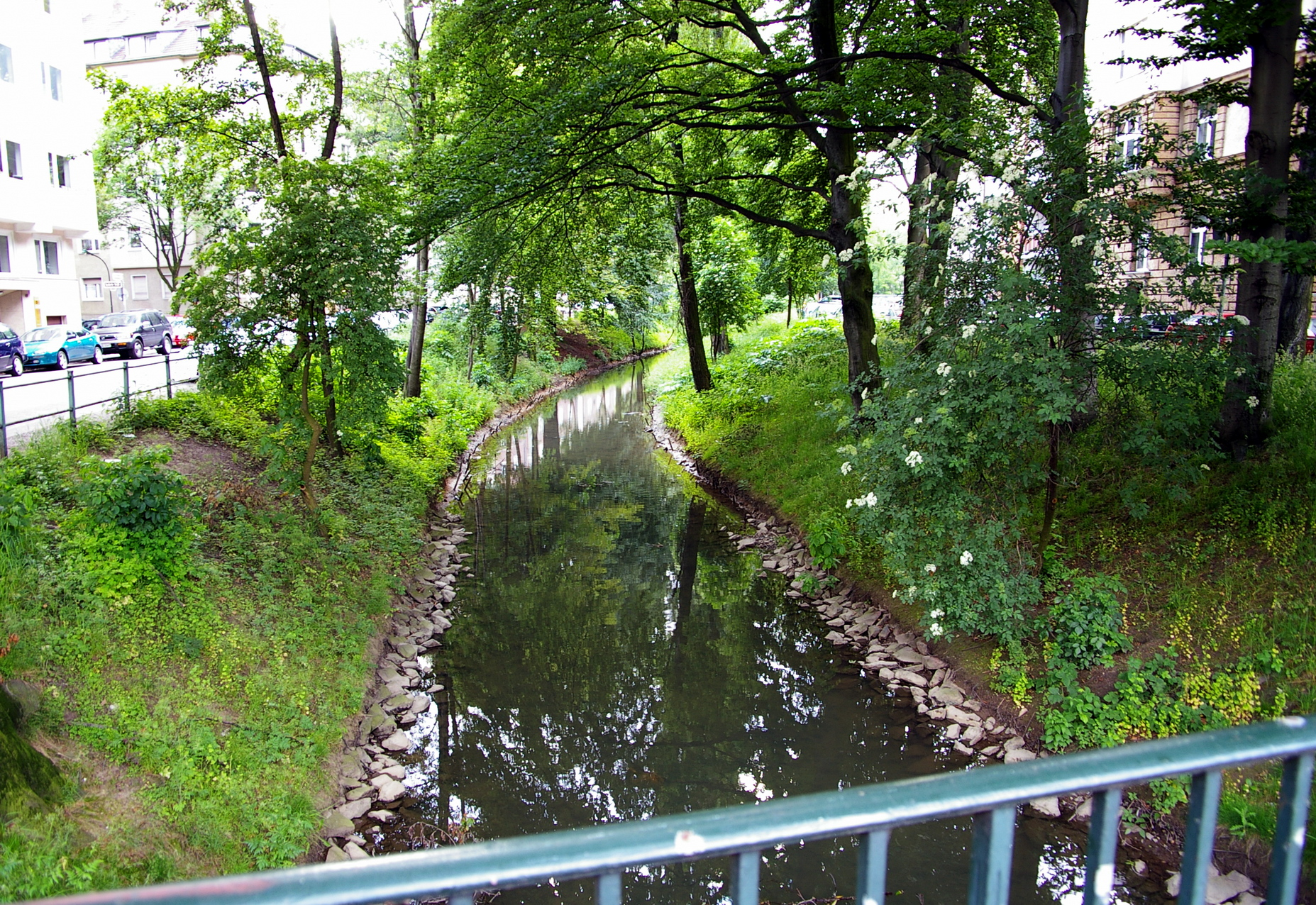 Düssel in Düsseldorf, Kühlwetterstraße, Nähe Eisstadion. Genehmigung: siehe unten Sonstiges